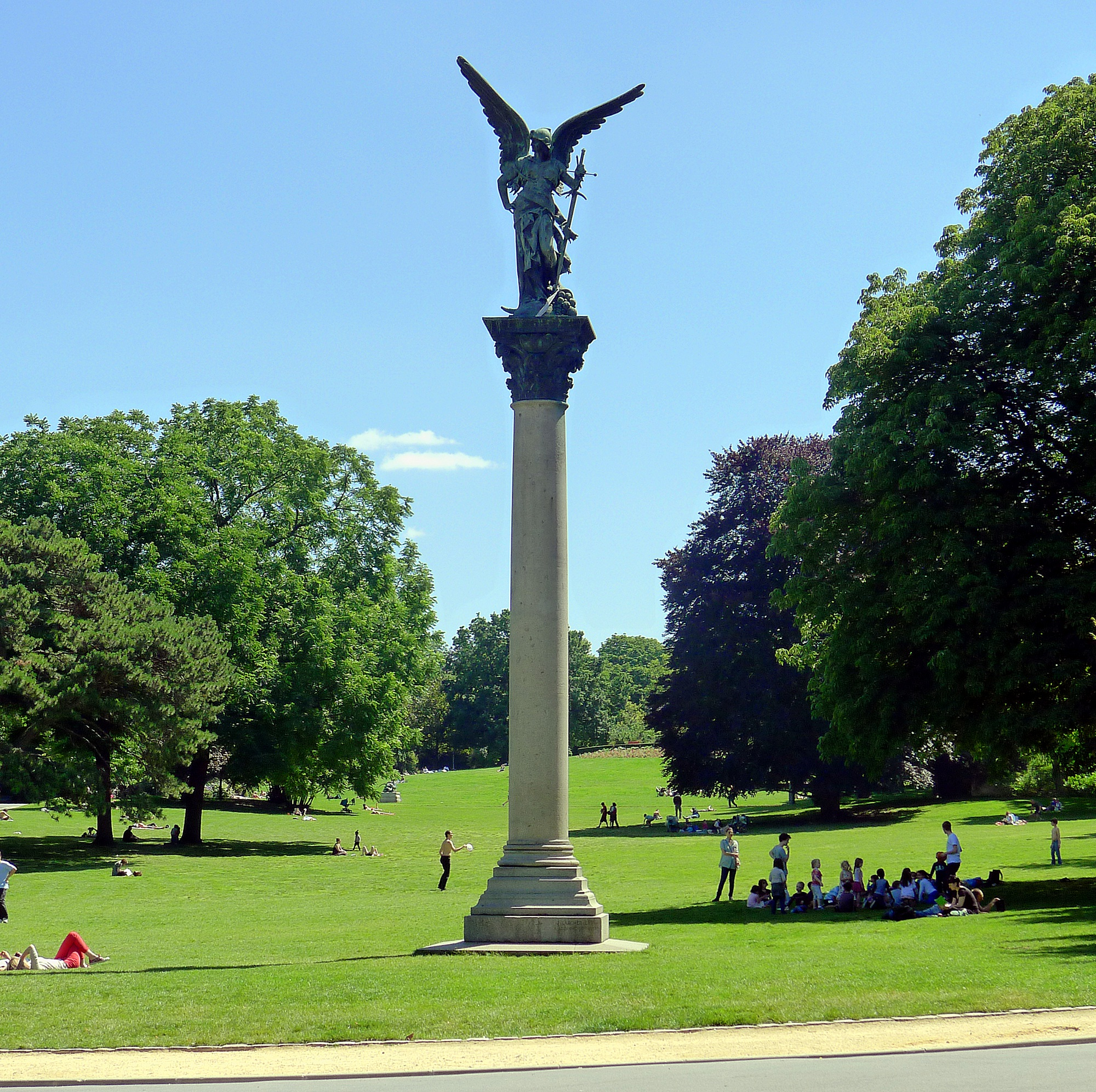 Pelouse autorisée, Parc Montsouris - Paris XIV